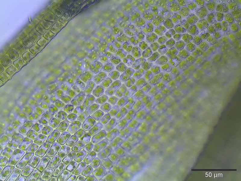 Gespitztblättriges Bärtchenmoos (Barbula unguiculata), Laminazellen, etwa 400x vergrößert